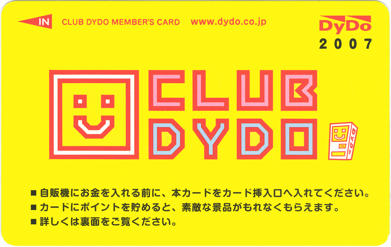 投稿者自身による作品